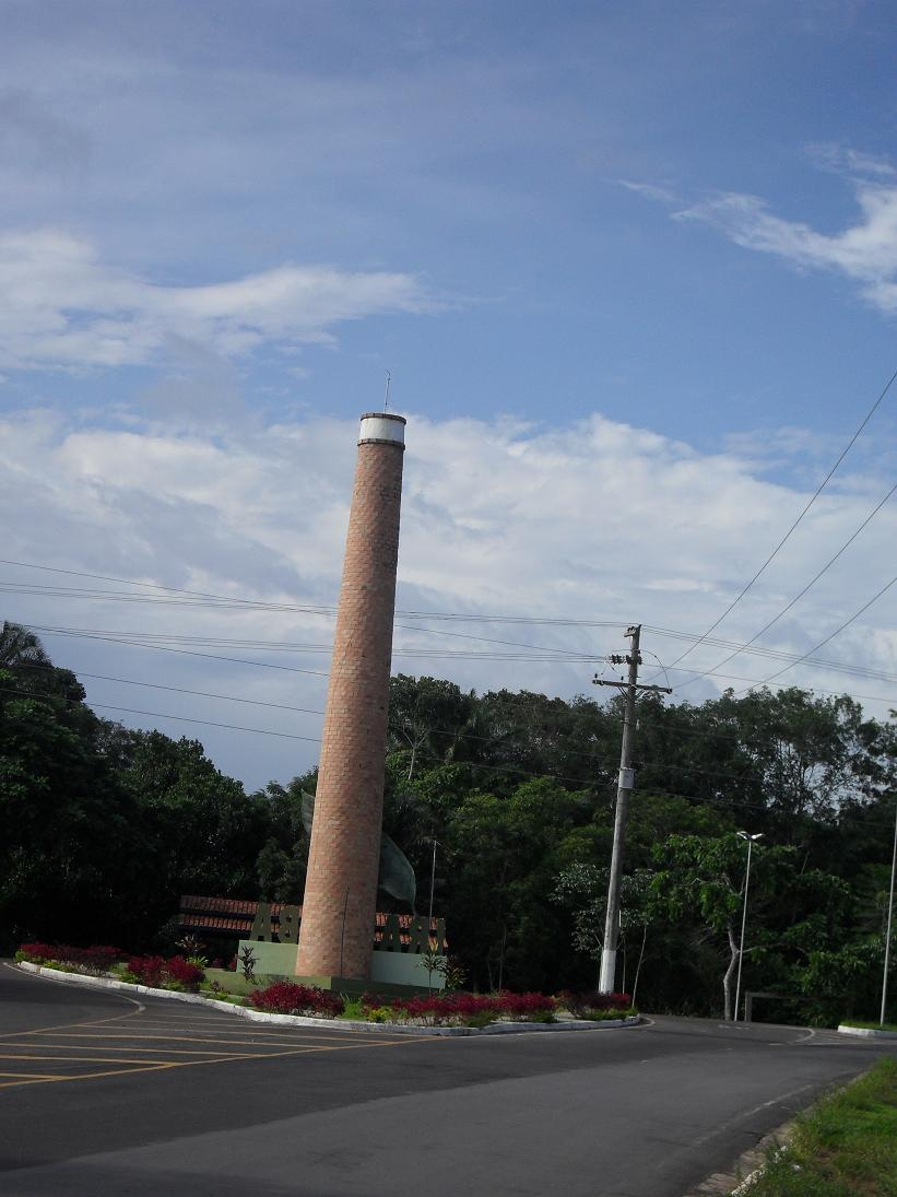 Entrada da Cidade de Iranduba, Amazonas.